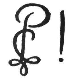 Zirkel des Kränzchens Pappenhemia Königsberg i. Pr. (1824-1841)